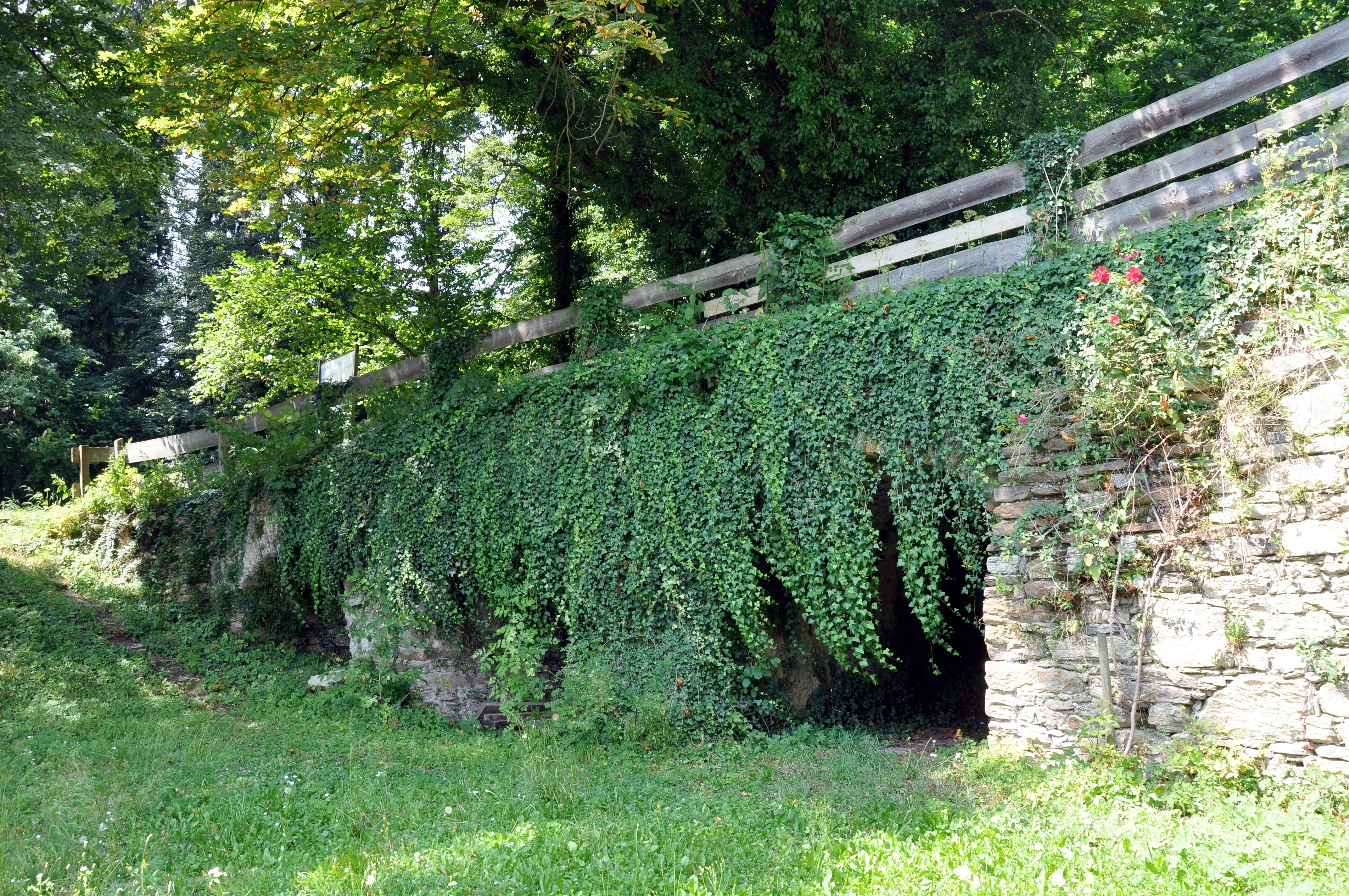 Brücke über den Halsgraben der Burgruine Ligist (Altes Schloss, Veste Lubgast).